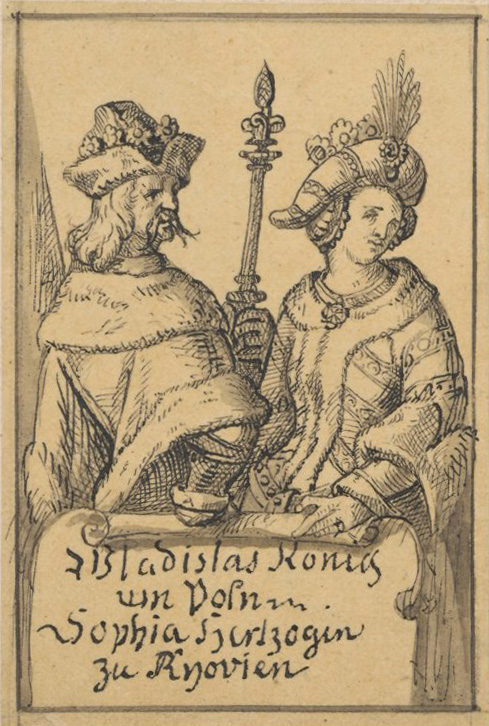 Беларуская (тарашкевіца): Партрэт Ягайлы (Jagajła) і Соф’і Гальшанскай (Sofja Halšanskaja)